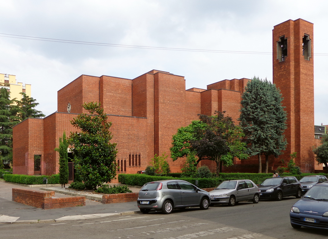 Milano, la chiesa dei Santi Giovanni e Paolo